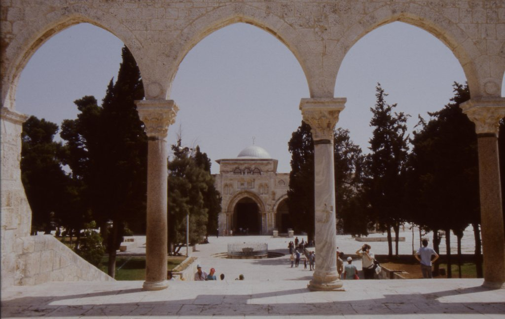 Al Aqsa Moschee vom Felsendom aus